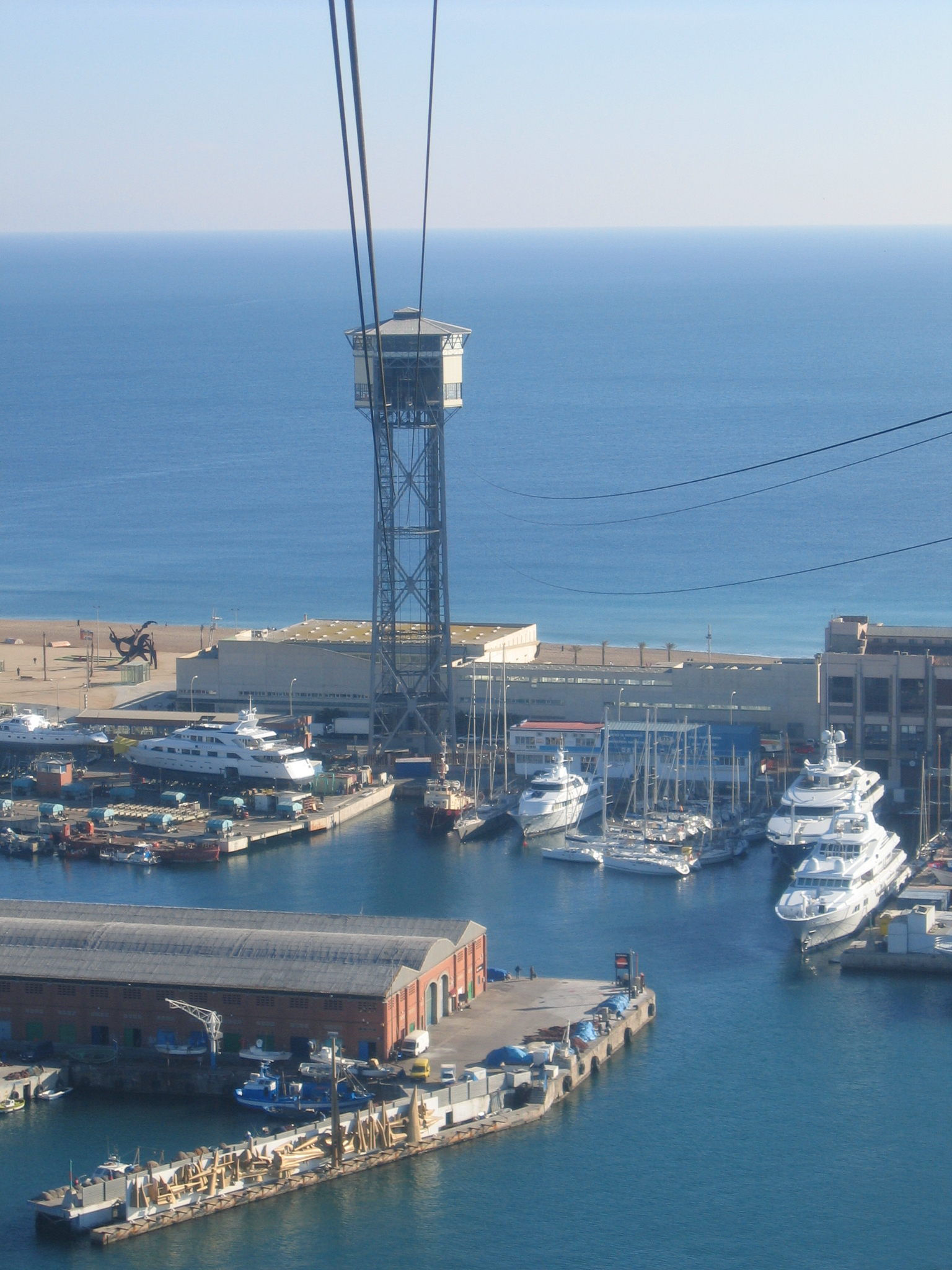 Barcelona - Torre Sant Sebastia